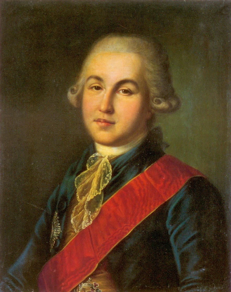 Пётр Александрович Бутурлин (1734-1787), граф, тайный советник, камергер.